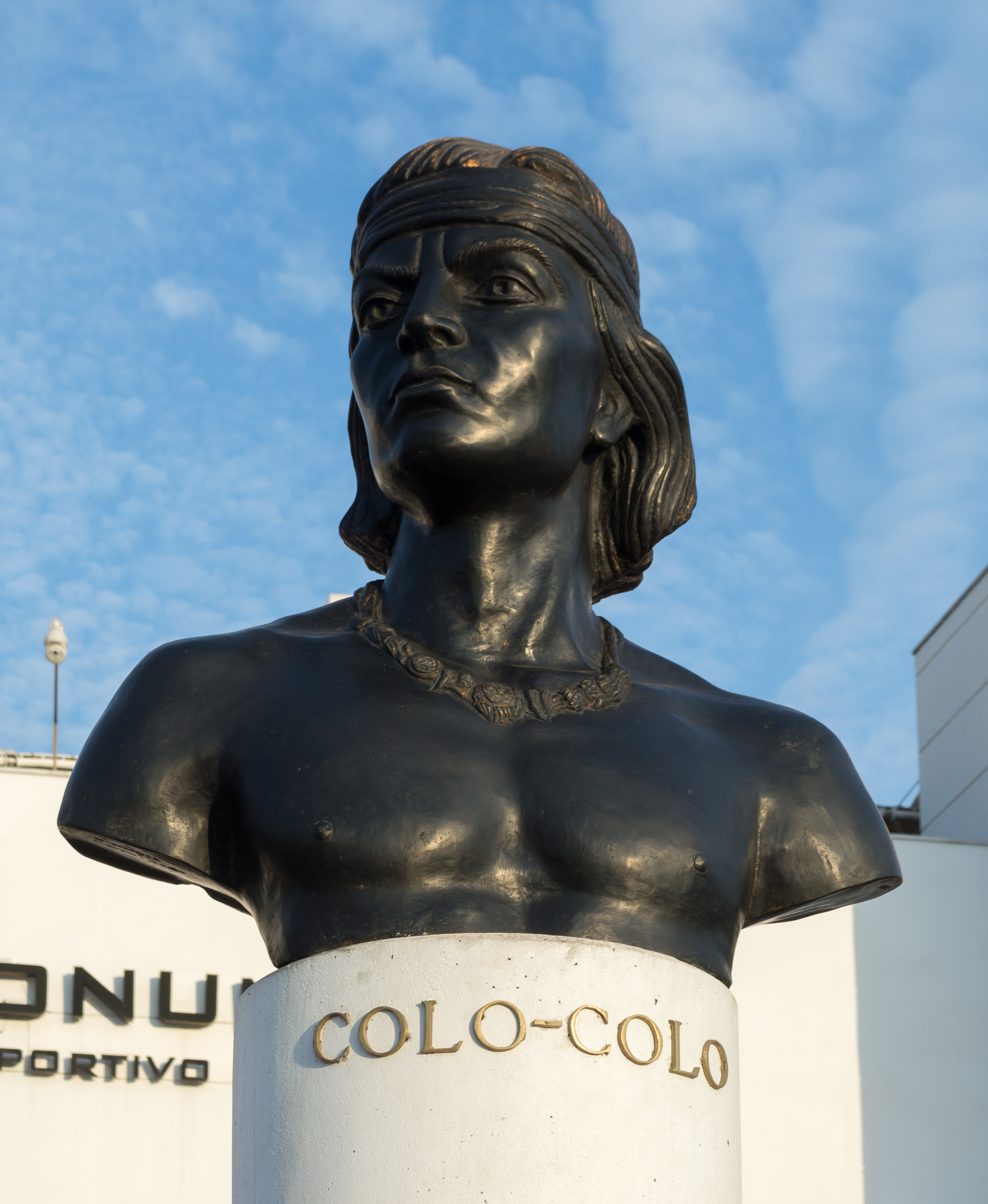 Colo-Colo v Palestino, Estadio Monumental, Macul, Santiago, Región Metropolitana, Chile